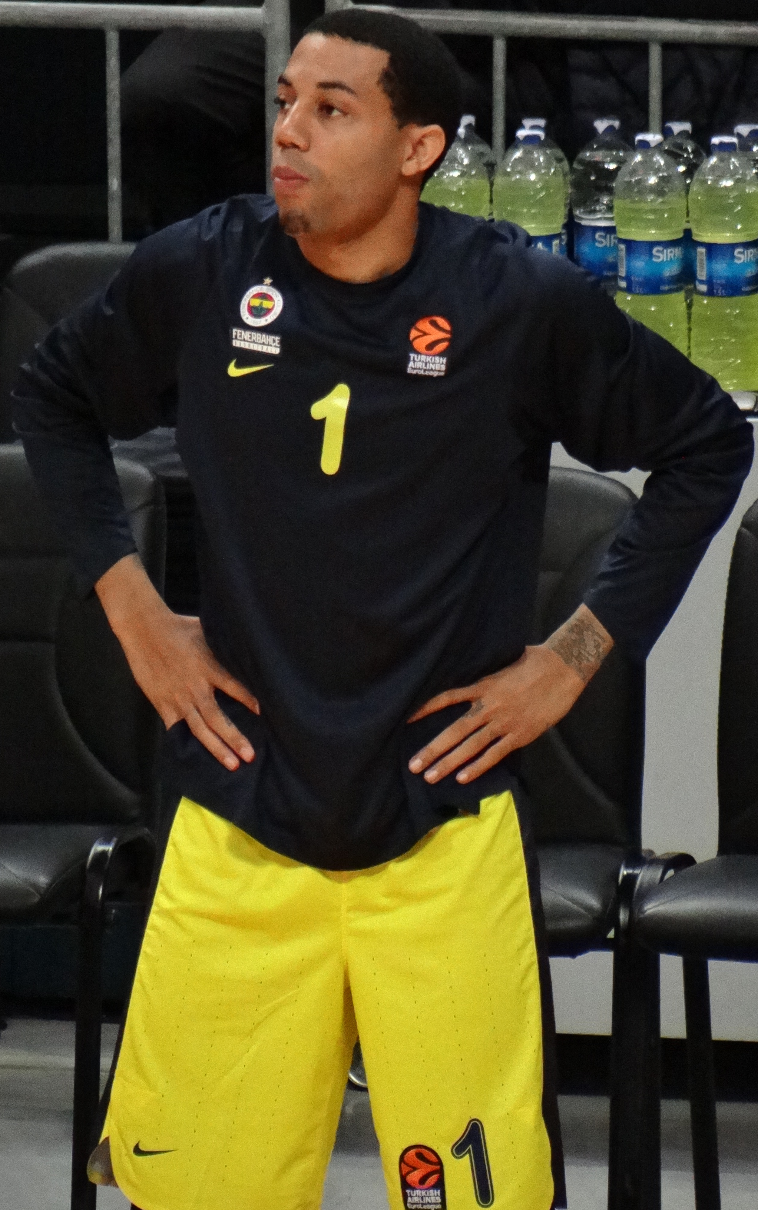 Erick Green Fenerbahçe men's basketball20181120